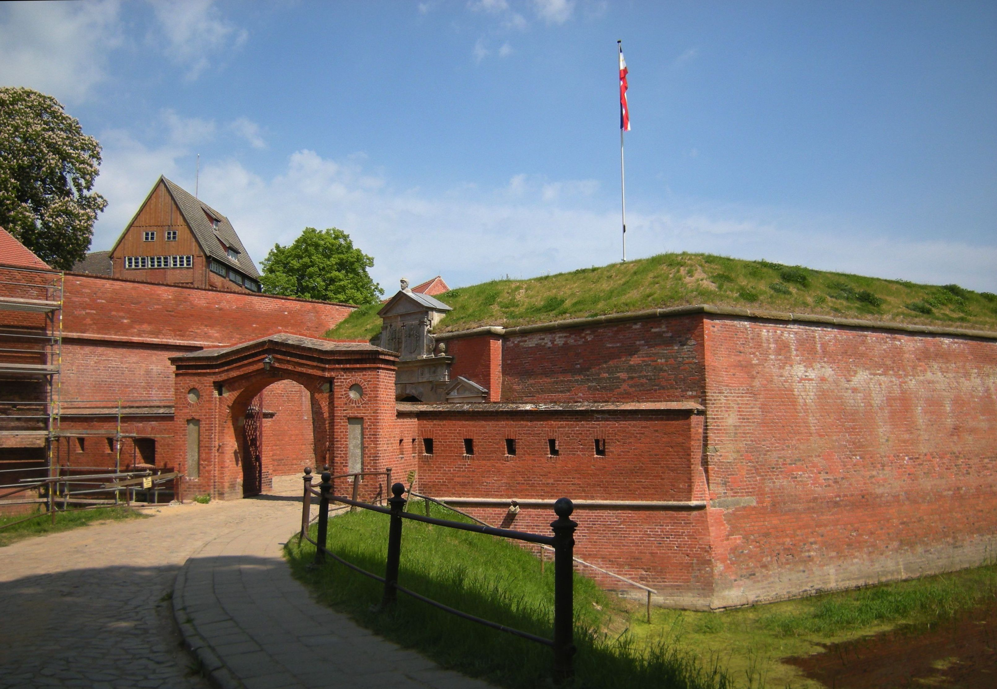 Dömitz-Festung mit Burggraben und Eingangstor.jpg